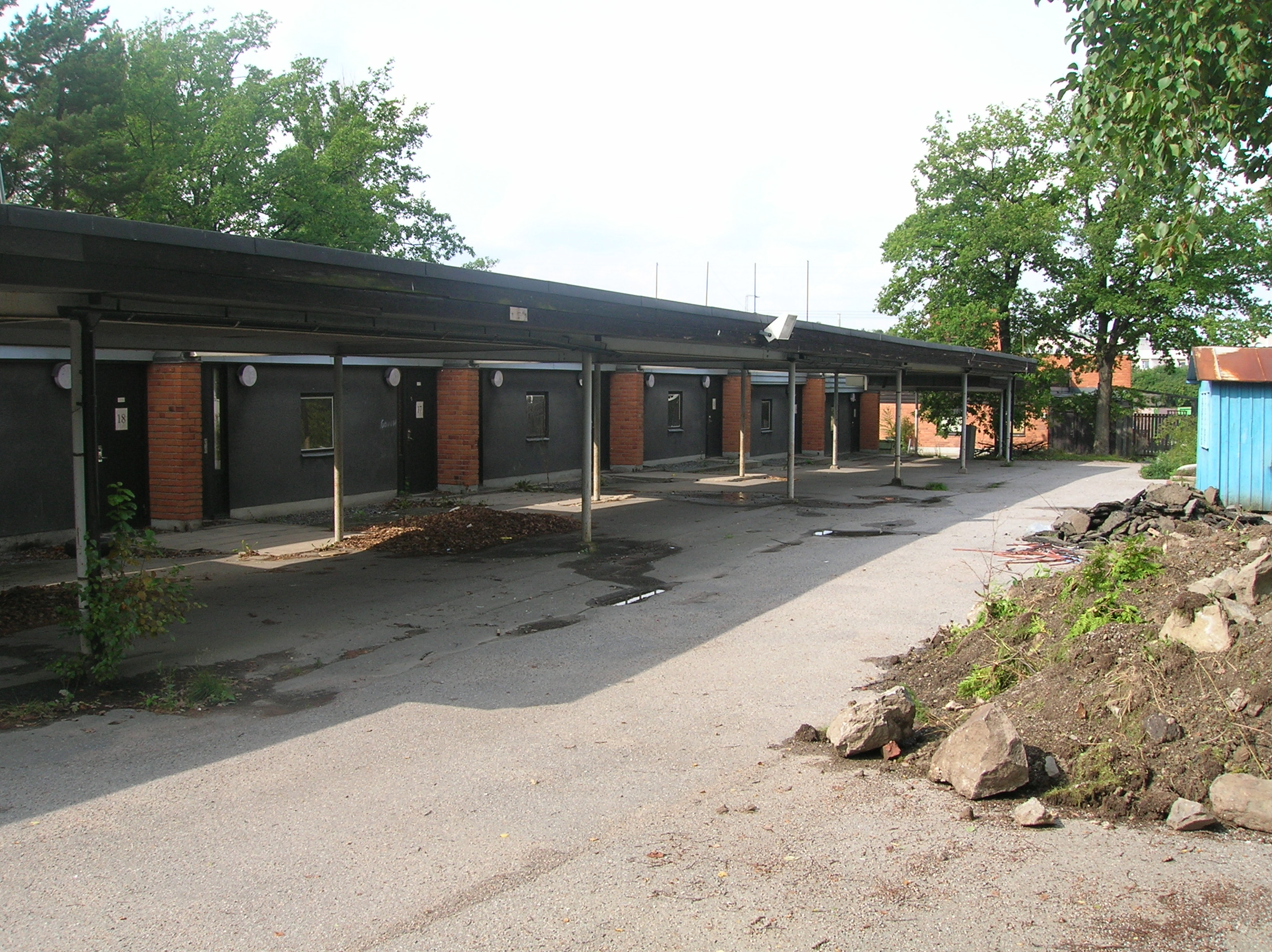 Motell Gyllen Ratten, Fruängen, Stockholm